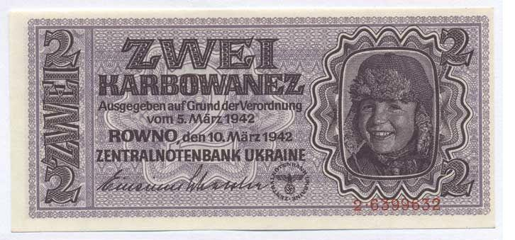 Два карбованці Райхскомісаріату Україна (Рівне). Аверс